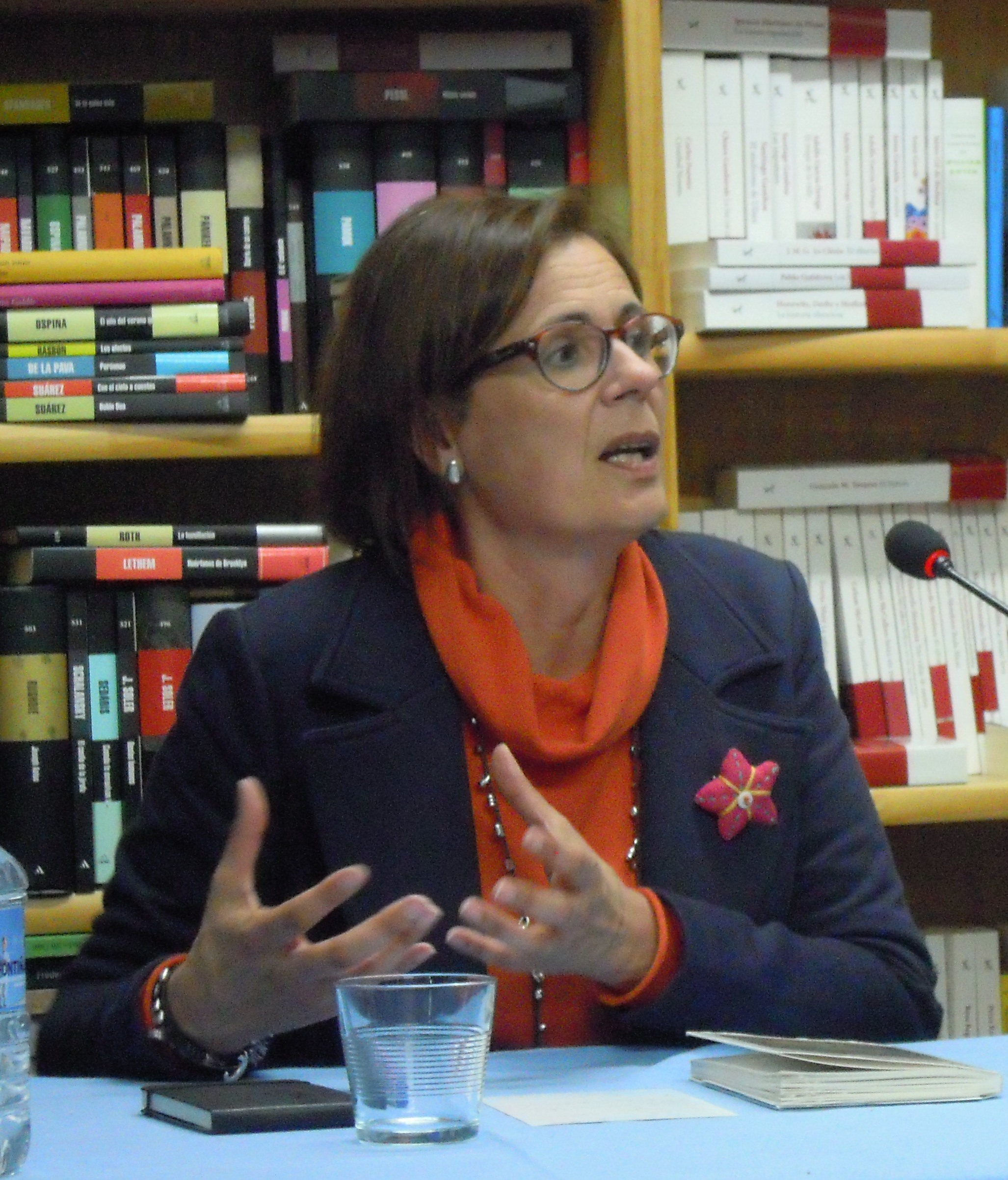 Carme Adán na presentación do libro O soño de Xoán de Farruco Graña na libraría Paz de Pontevedra